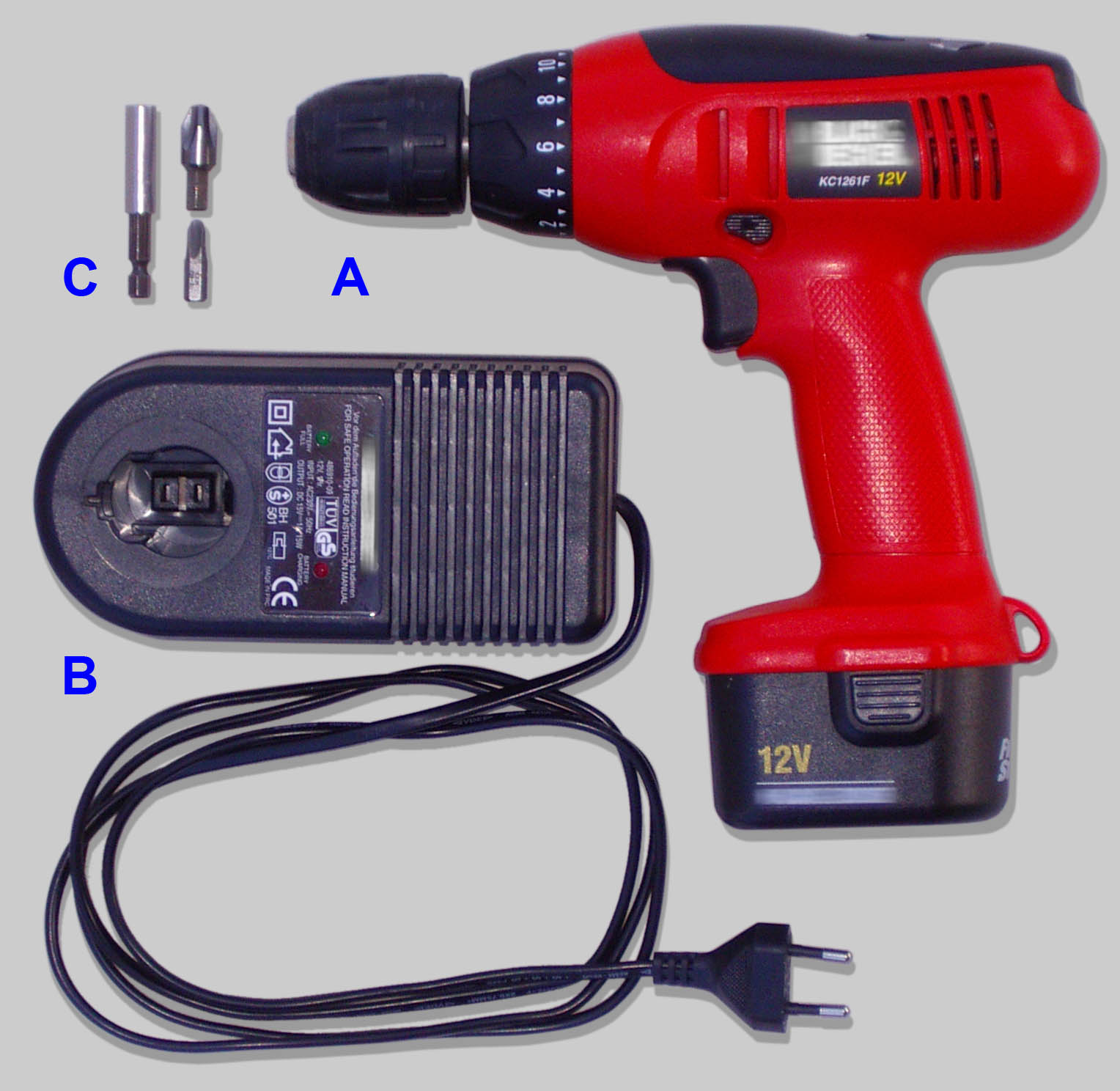 Wiertarka akumulatorowa: A - wiertarka wraz z akumulatorem B - ładowarka akumulatorów C - końcówki wkrętaków Autor: Ssawka Grafika udostępniona na licencji GFDL